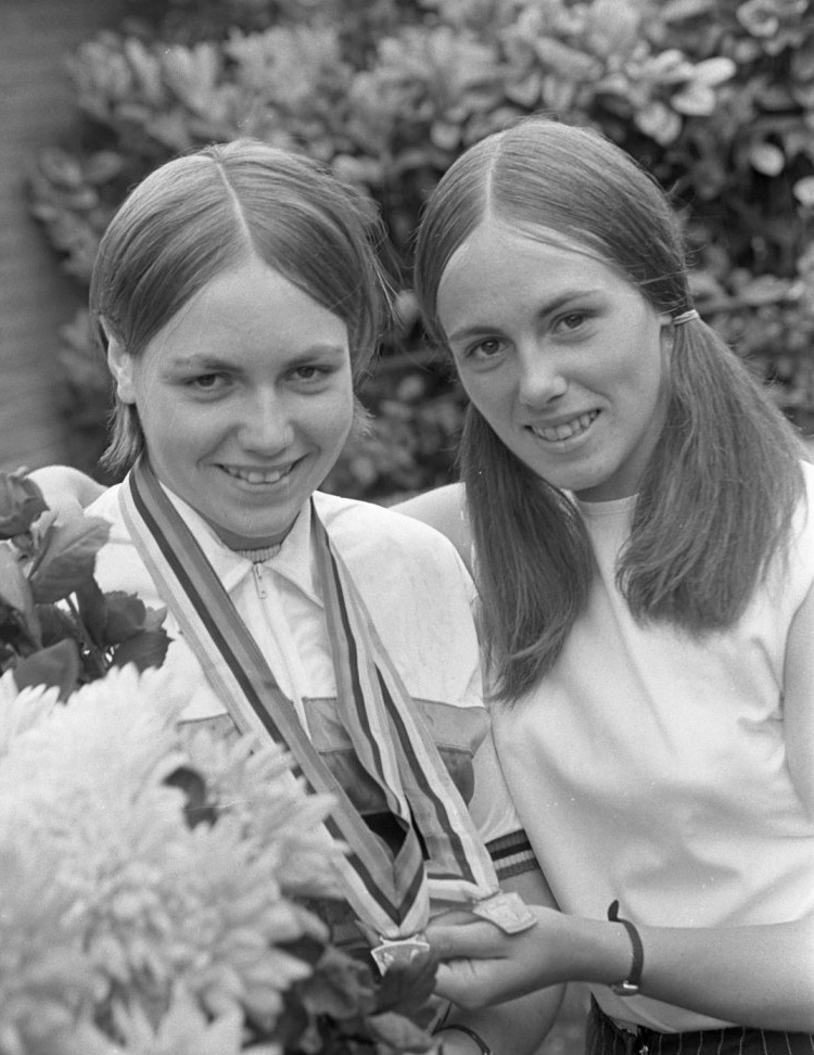 Huldiging van Keetie Hage (links) als wereldkampioene op de weg (dames). Naast haar staat Bella Hage